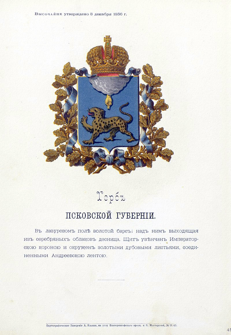 Official Russian Empire coat of arms Pskov Governorate. Герб Российской Империи Псковской губернии с официальным описанием в Гербовнике Бенке. Утверждён Императором Всероссийским Александром Вторым.